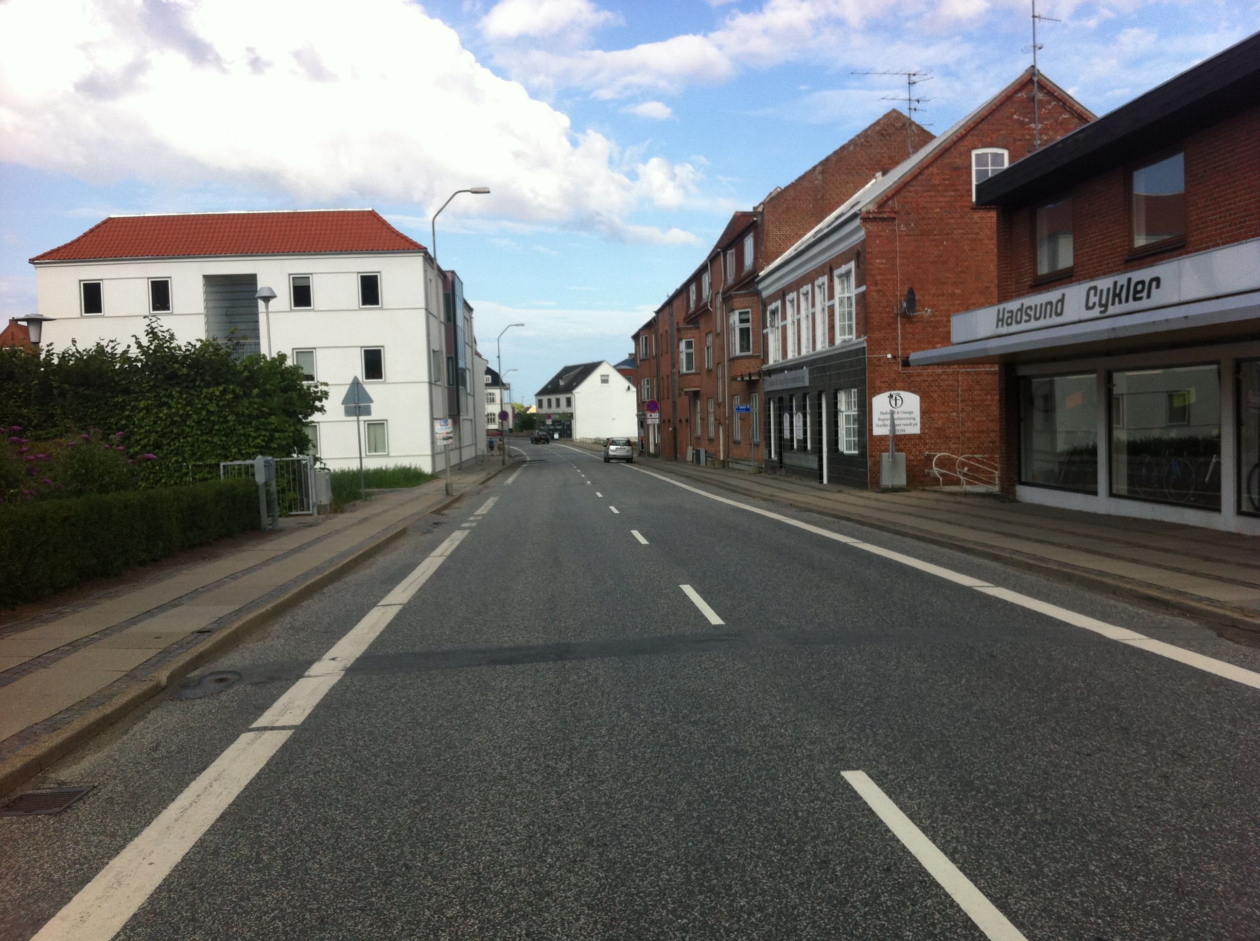 Vestergade, 9560 Hadsund.